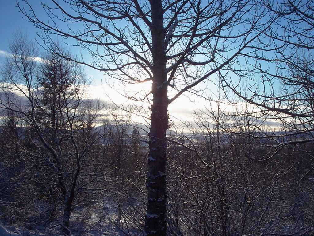 mogilsa1.jpg